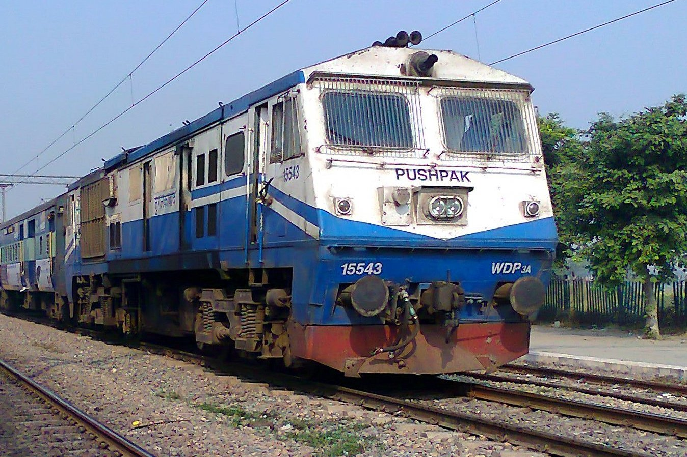 WDP3A 15543 PUSHPAK of Tughlakabad